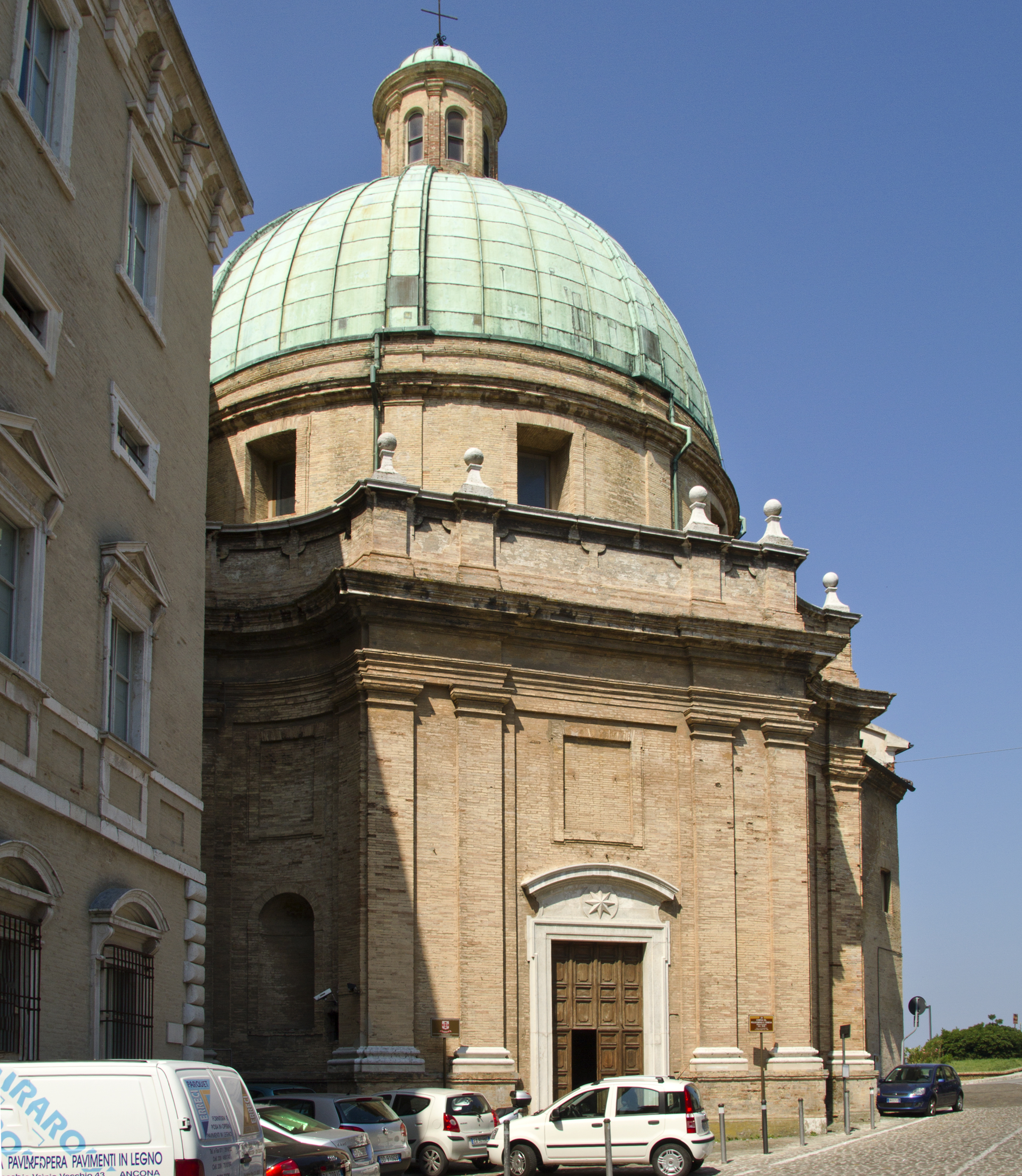 Chiesa dei SS. Pellegrino e Teresa, Ancona, Marche, Italy